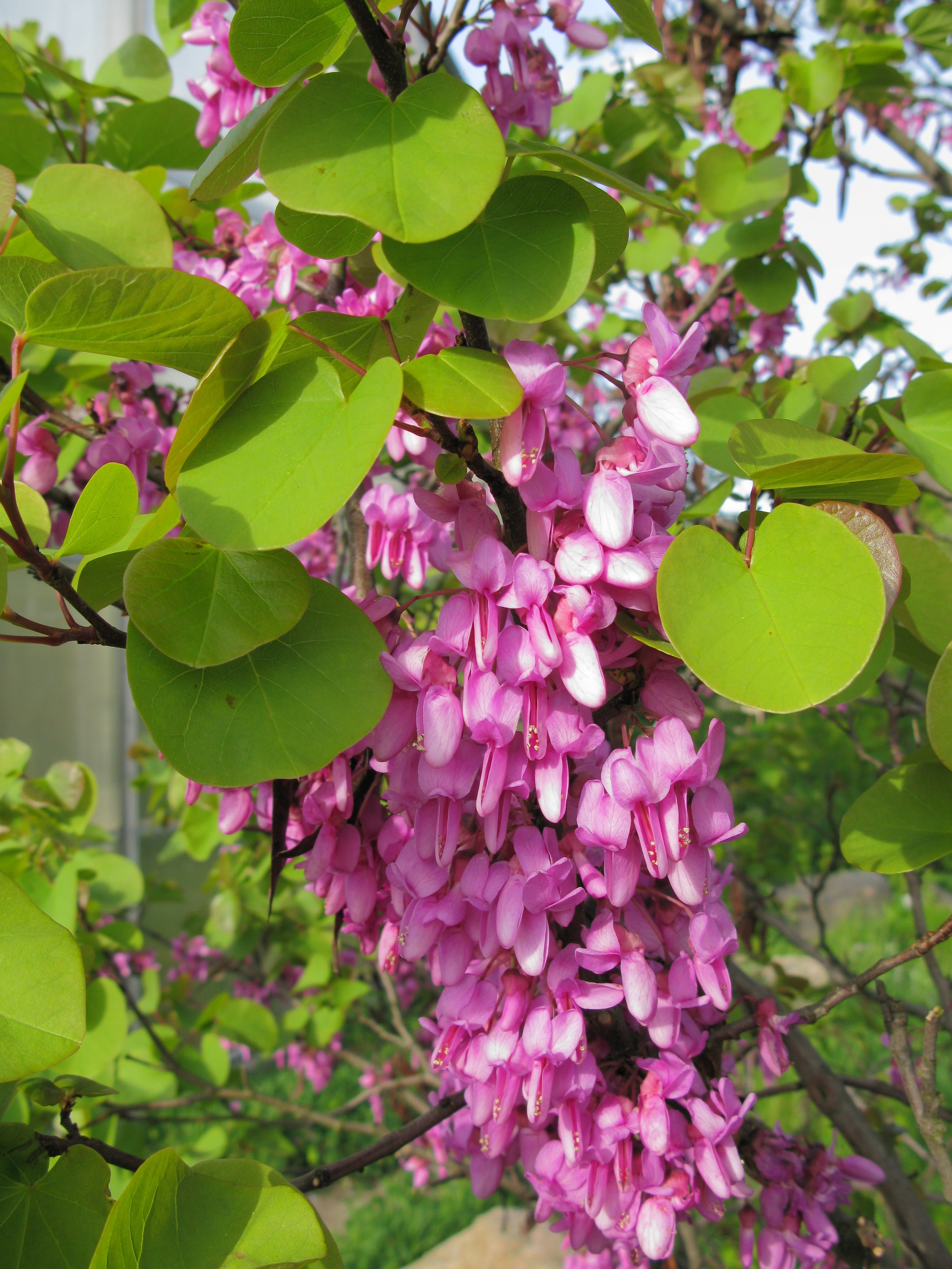 Gewöhnlicher Judasbaum